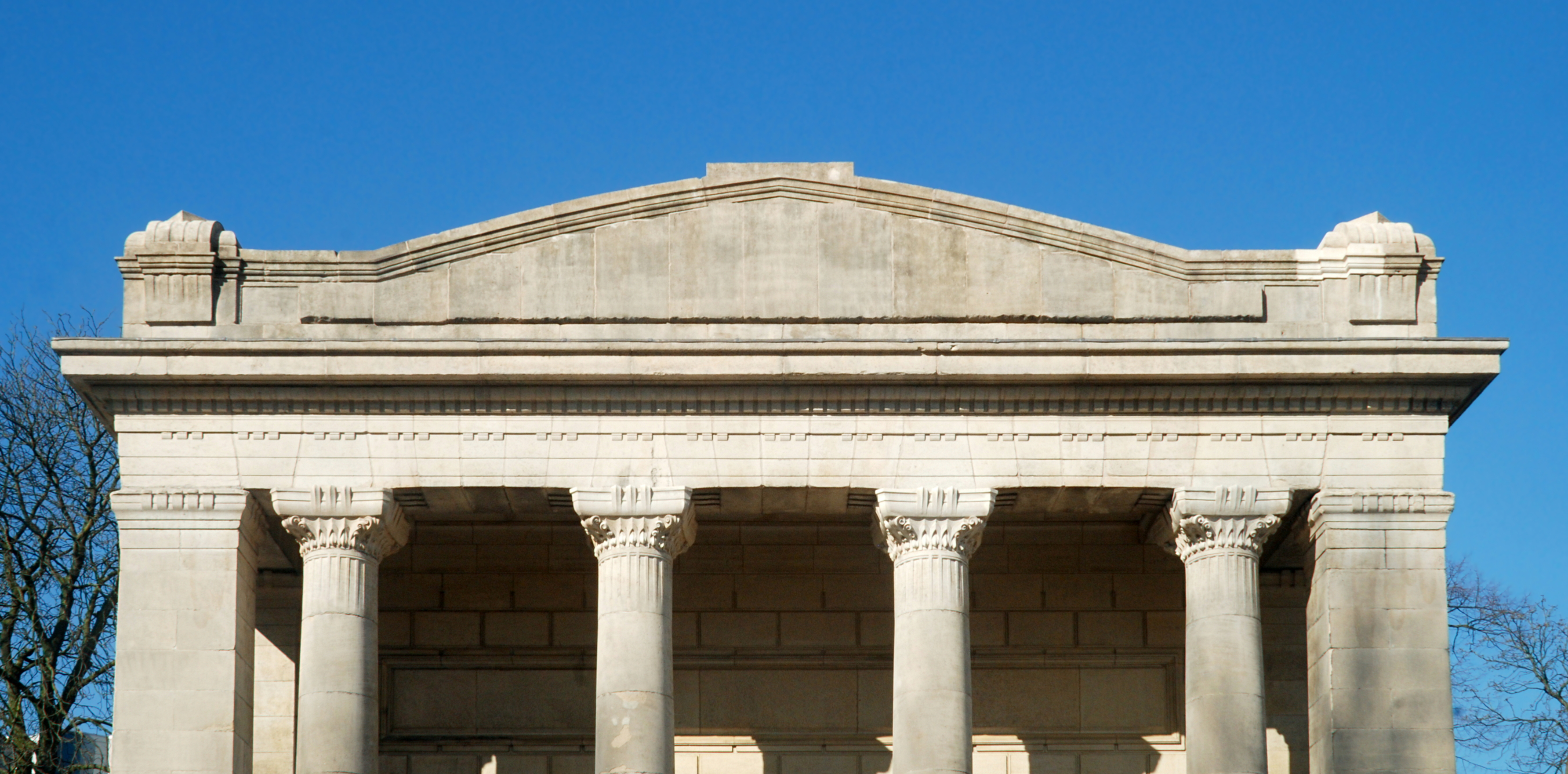 Belgique - Bruxelles - Pavillon des Passions humaines (architecte Victor Horta - 1890-1897)